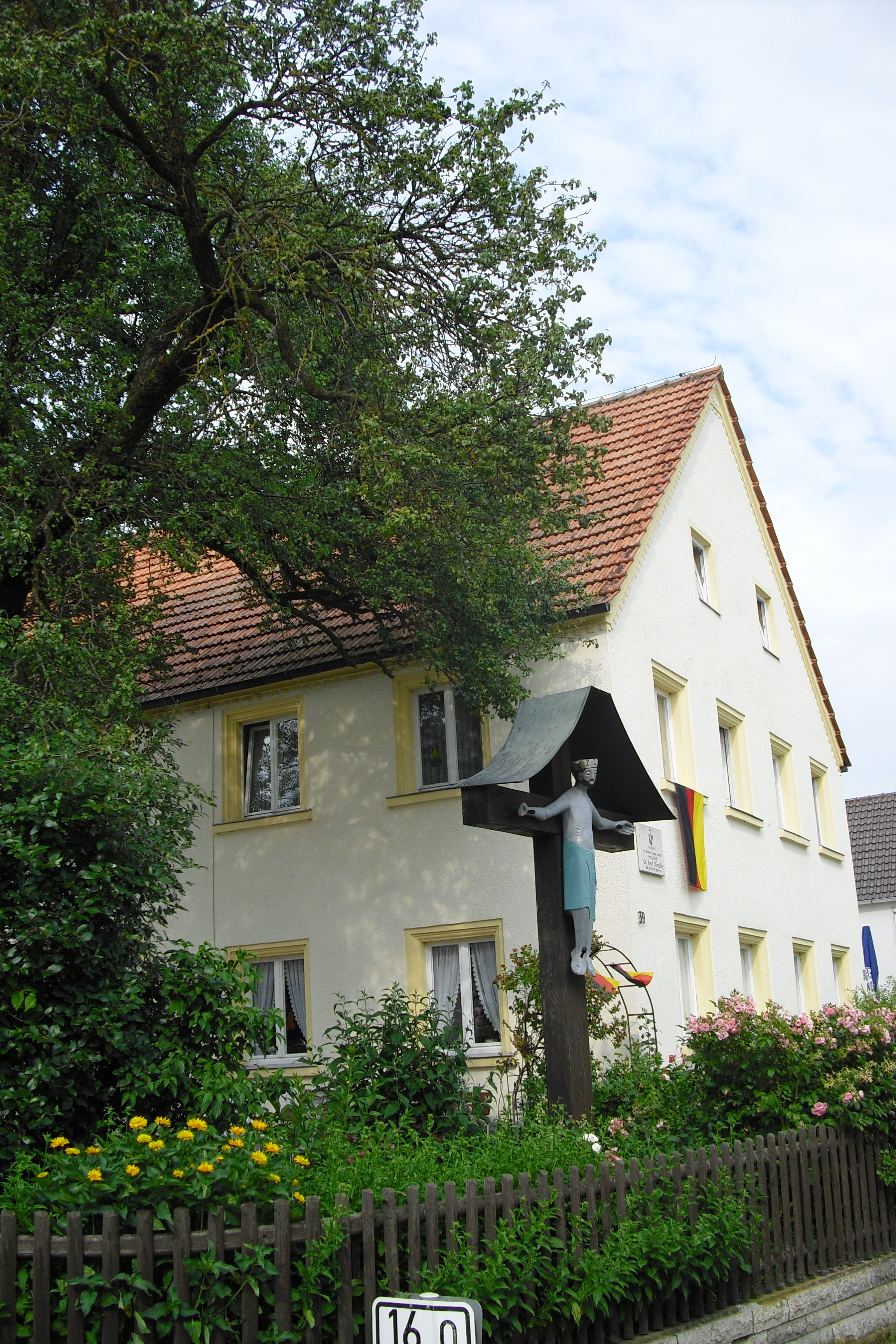 Geburtshaus des Erzbischofs Josef Stimpfle in Maihingen